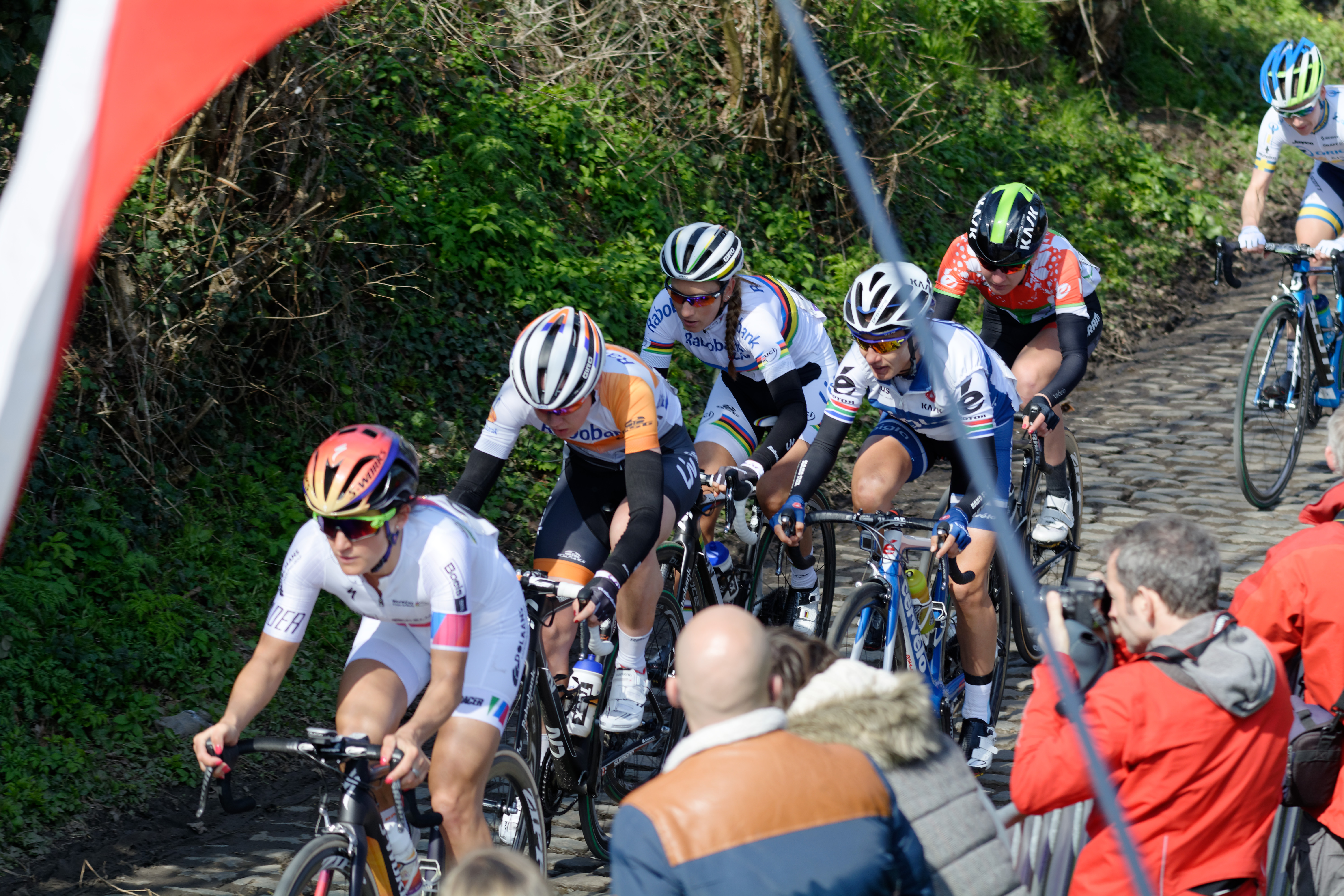 D71_6394_DxO